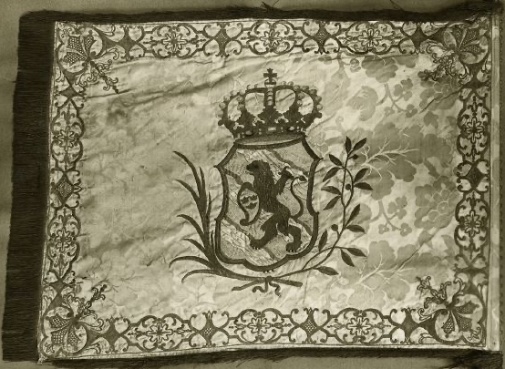 Borgerskapets i Göteborgs militärkår. Vitt fasonerat siden med broderier i färger, silke, guld- och silvertråd, i mitten Göteborgs vapen; duken kantad med guldfrans, 79 X 93 cm. Standardstång med stympad konisk spets.